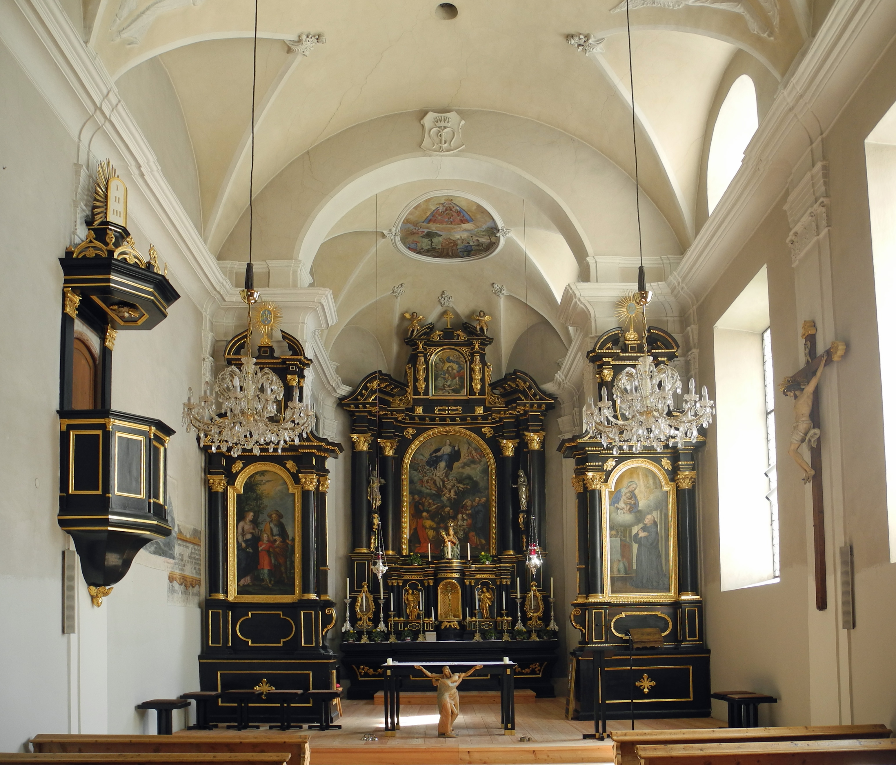 Altarraum und Kanzel der Wallfahrtskirche Maria Waldrast